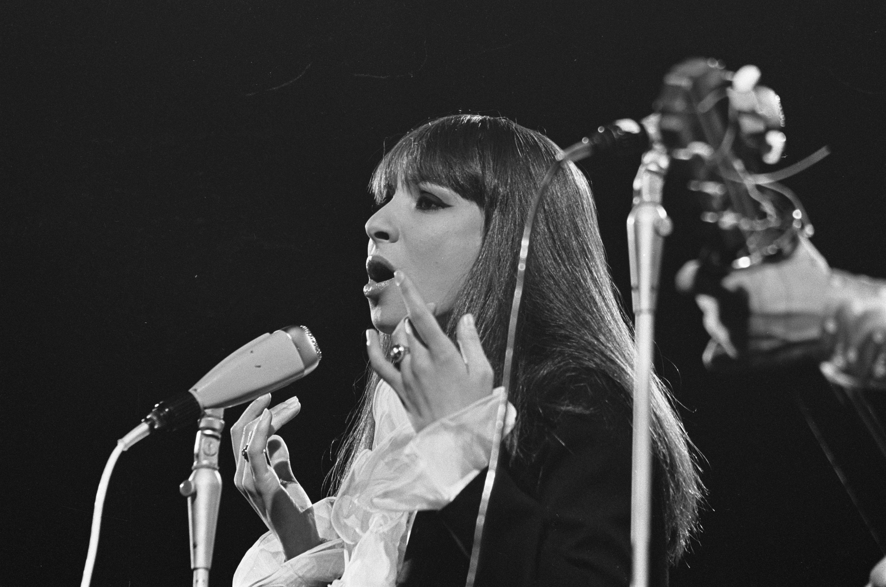 Collectie / Archief : Fotocollectie Anefo Reportage / Serie : Grand Gala du Disque 1968 Beschrijving : Grand Gala du Disque . Esther en Abraham Ofarim Datum : 8 maart 1968 Locatie : Amsterdam Trefwoorden : zangers Persoonsnaam : Ofarim, Abi, Ofarim, Esther Fotograaf : Kroon, Ron / Anefo Auteursrechthebbende : Nationaal Archief Materiaalsoort : Negatief (zwart/wit) Nummer archiefinventaris : bekijk toegang 2.24.01.05 Bestanddeelnummer : 921-1483